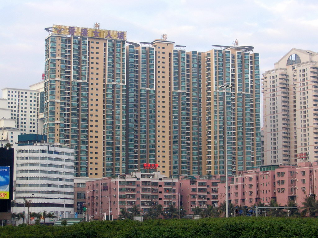 深圳市罗湖区住宅建筑物 Residential Buildings in Louhu District, Shenzhen